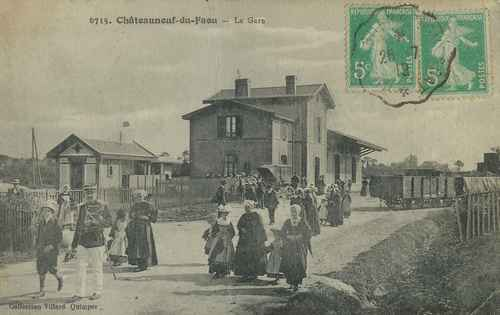 La gare de Châteauneuf du Réseau Breton.On ne distingue pas sur carte postale la gare des Chemins de fer armoricains qui jouxtait la gare du réseau breton représentée ici.